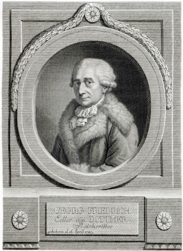 Georg Friedrich von Dittmer (1727-1811) bayerischer Adeliger und Bankier